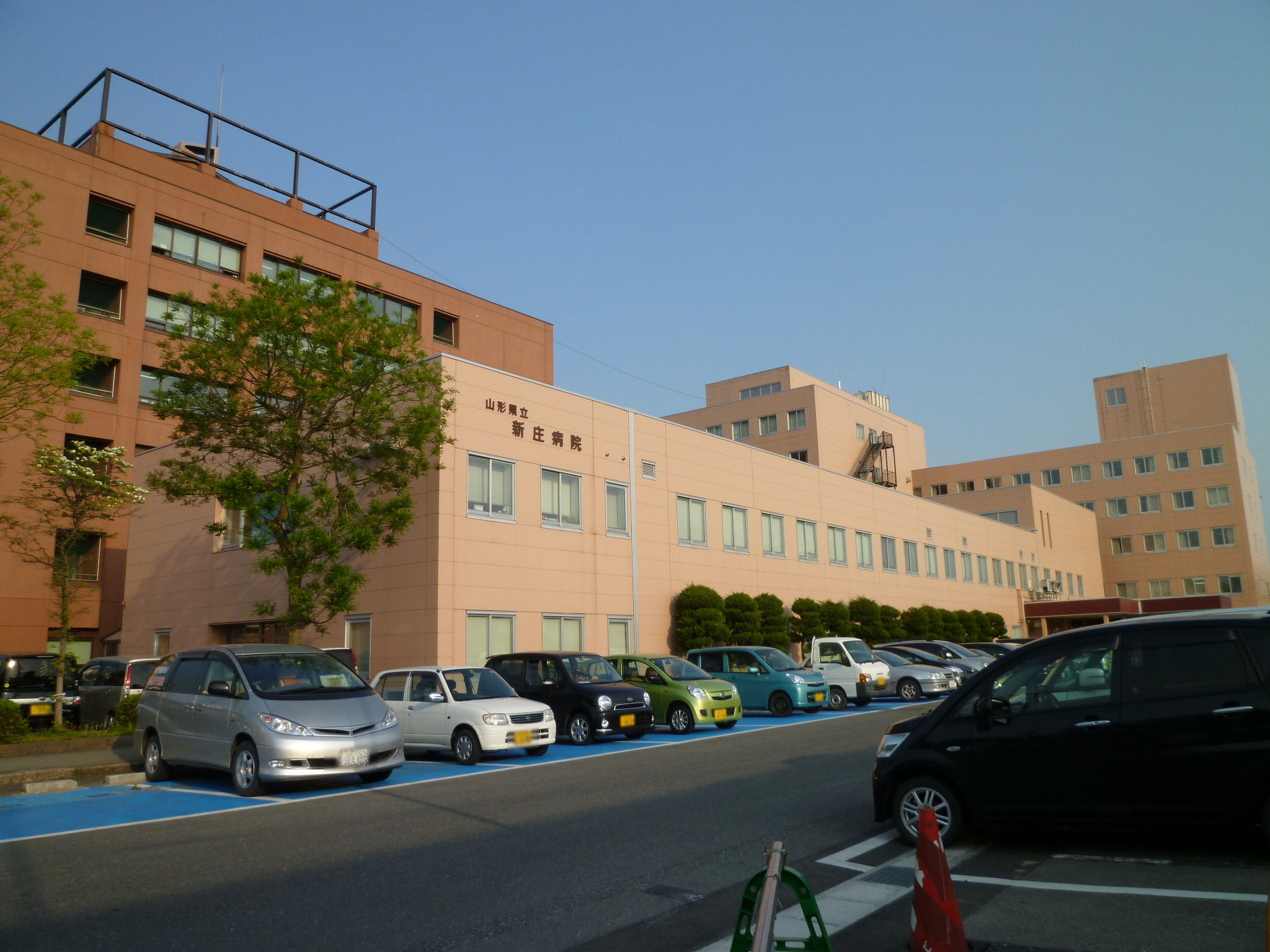 山形県立新庄病院。 山形県新庄市若葉町所在。